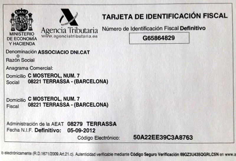 NIF de l'Associació DNI.cat